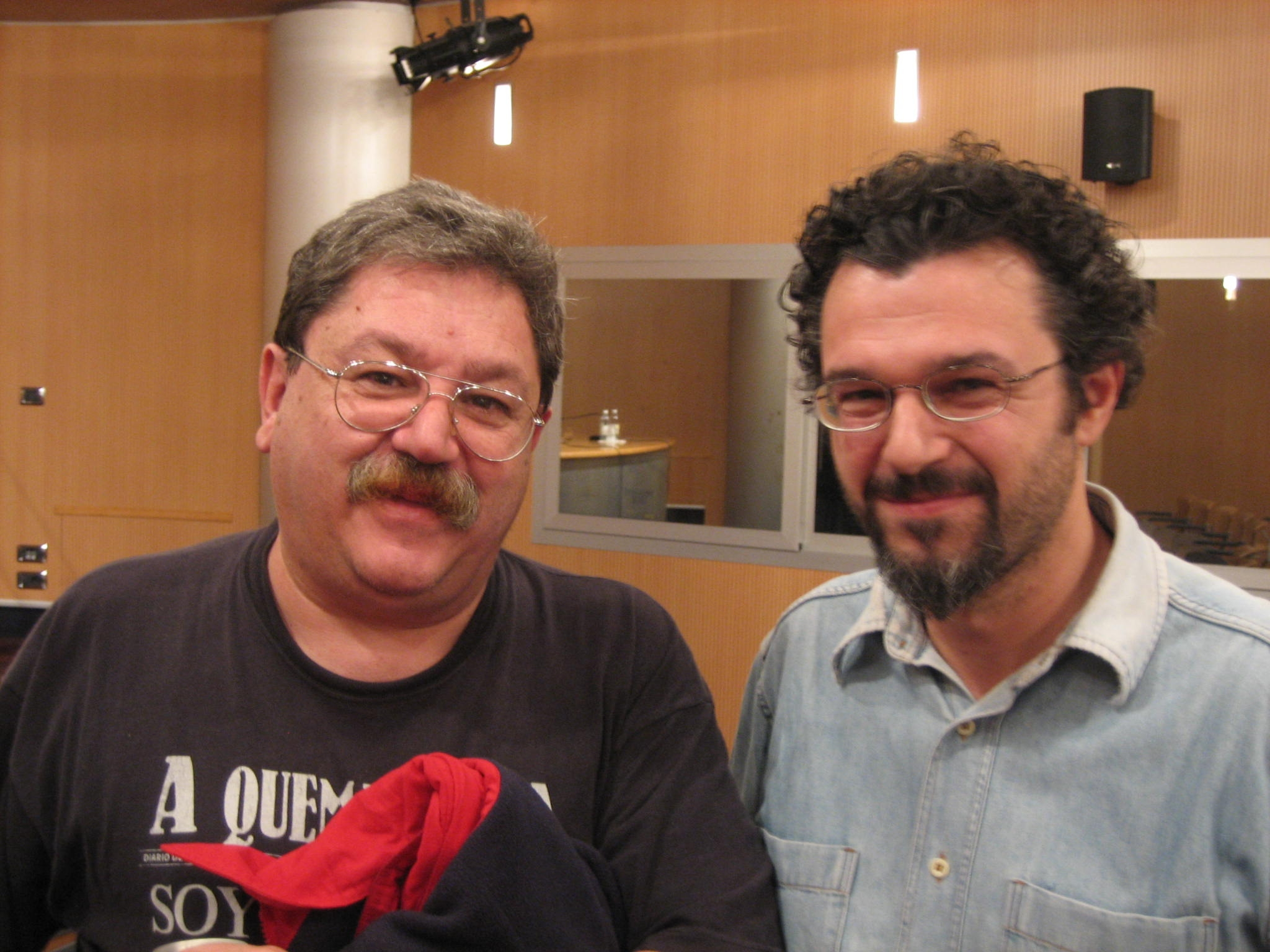 Marco Sommariva con Paco Ignacio Taibo II